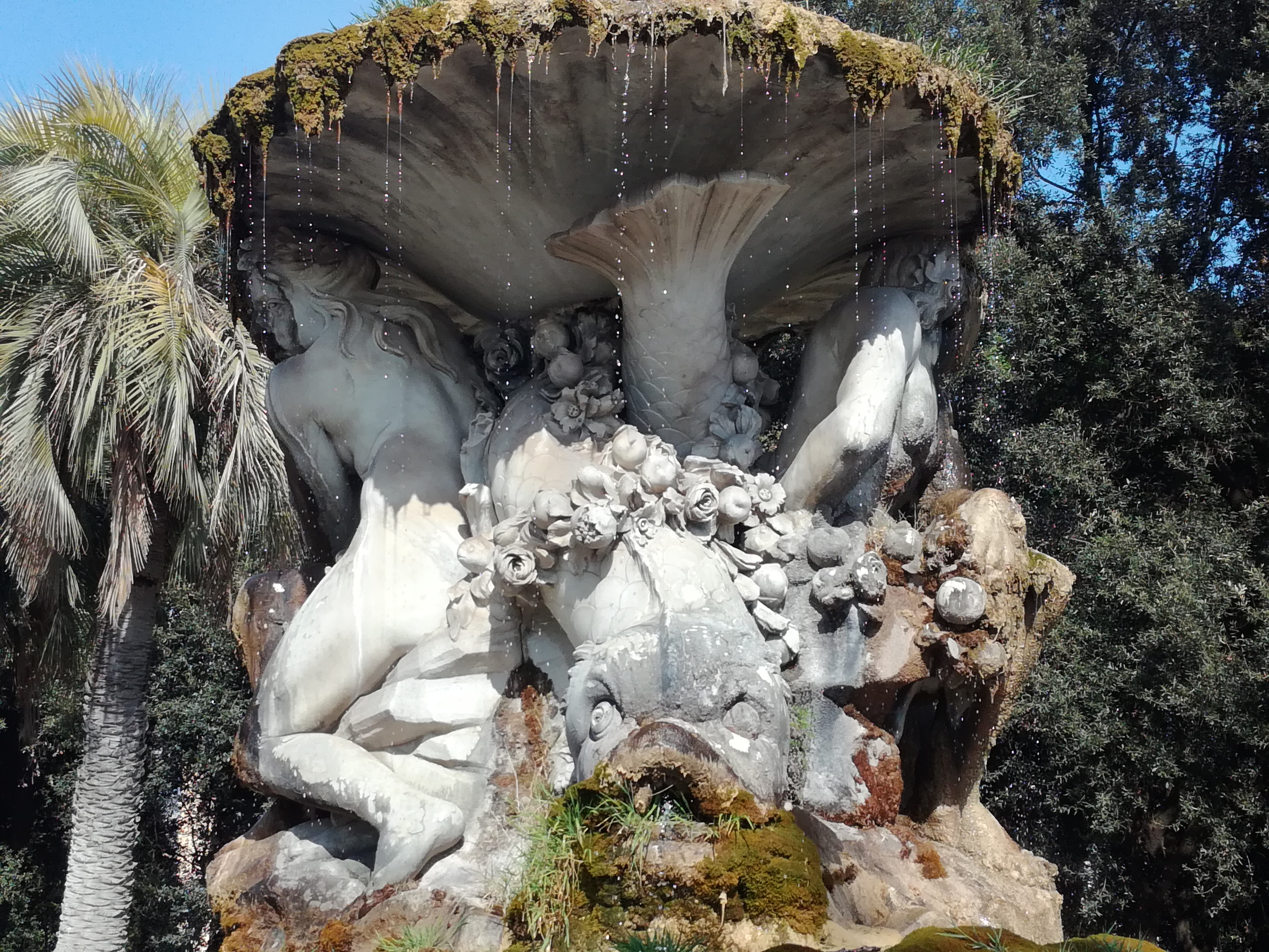 Particola della Fontana del Belvedere (Napoli)